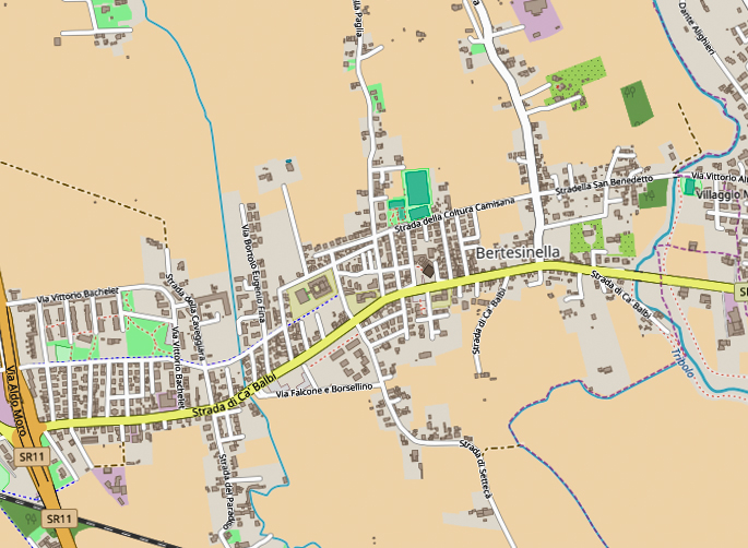 Mappa frazione Bertesinella